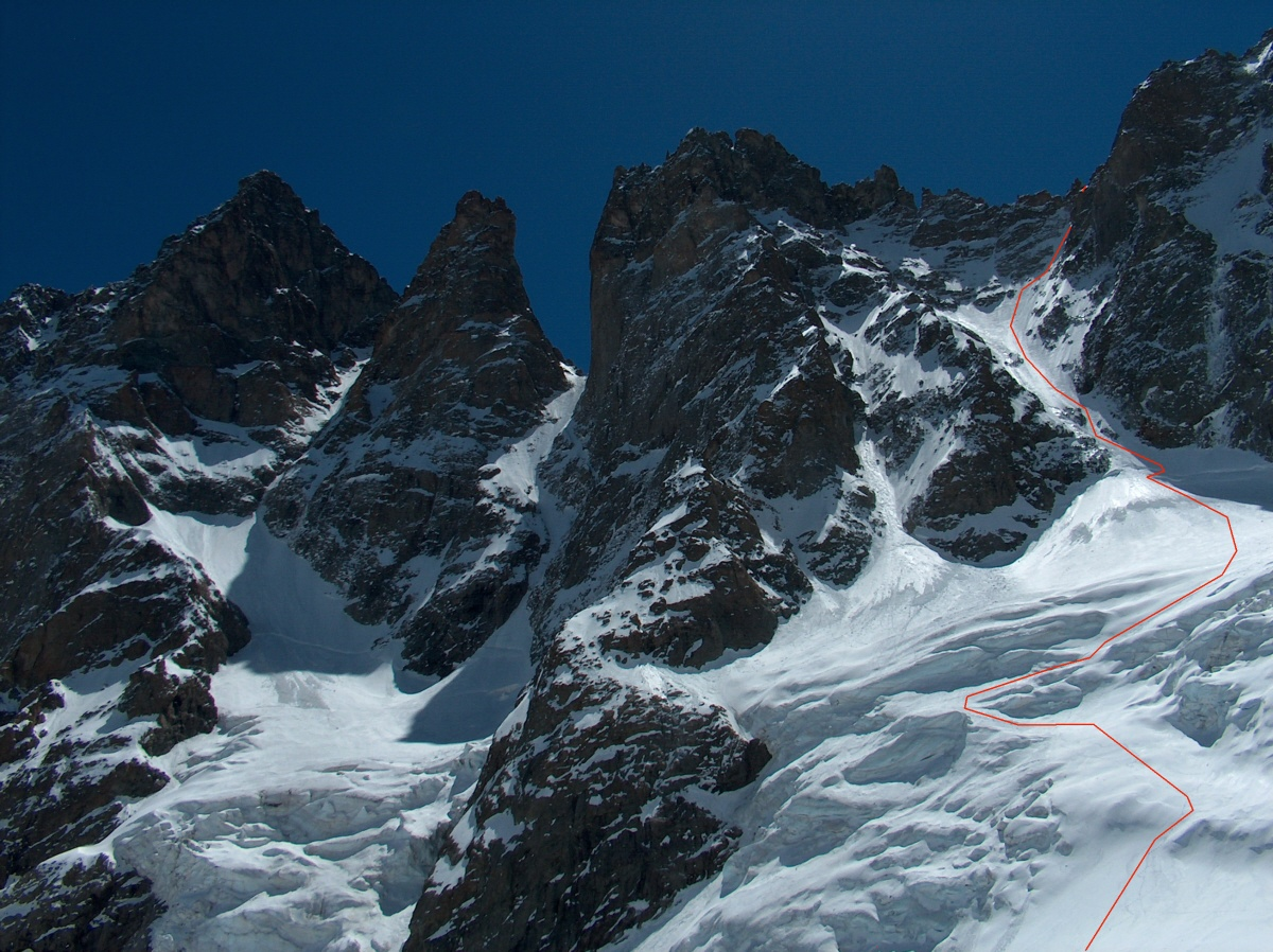 De gauche à droite: couloirs du Pic Sans Nom, du Coup de Sabre et du Col du Glacier Noir. En rouge, l'itinéraire aller/retour pour le Col du Glacier Noir.